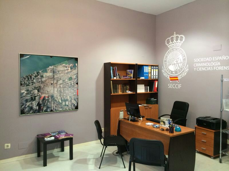 Sede de SECCIF en la plaza del Viejo Coso